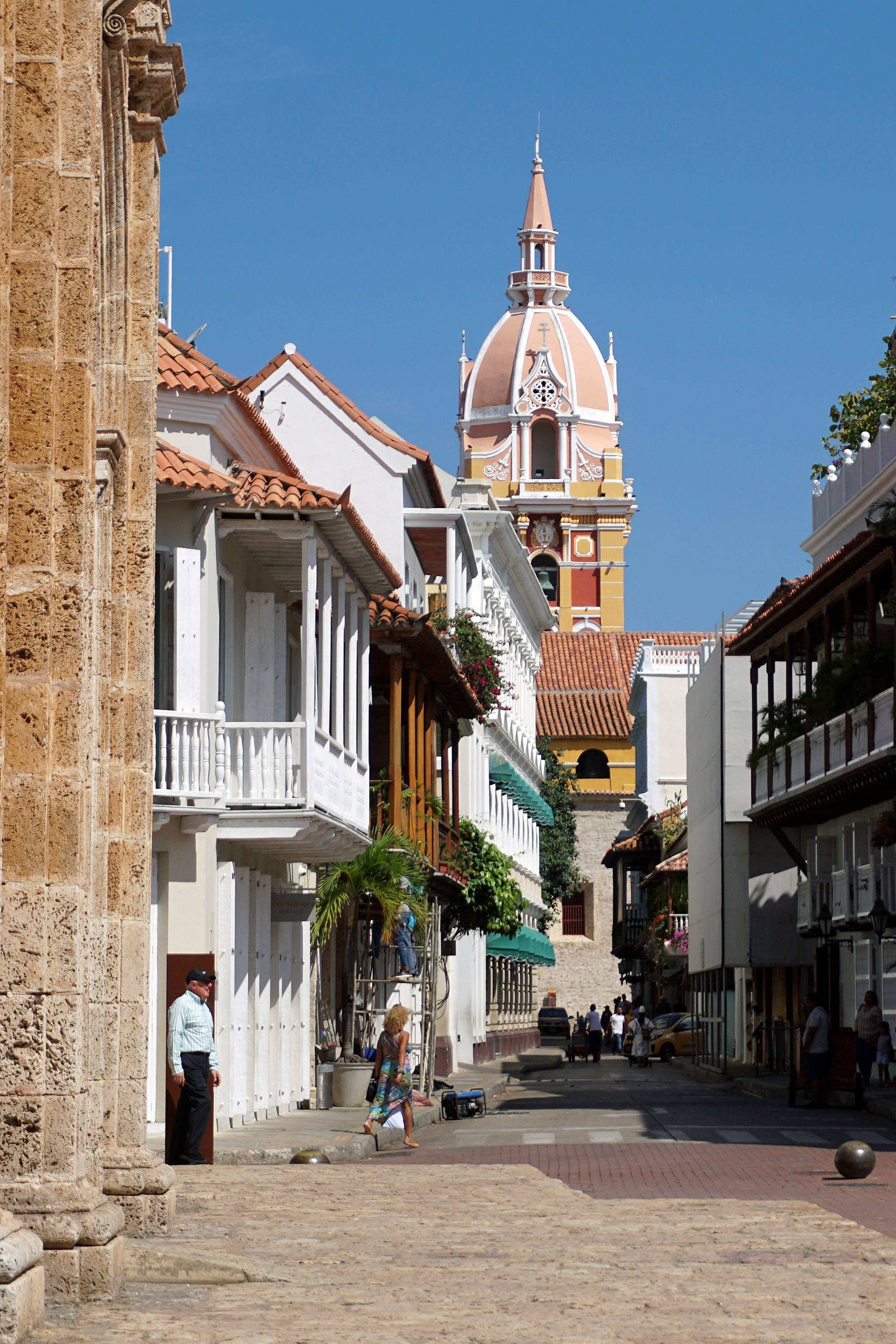 Catedral de Santa Catalina de Alejandría vista desde a Iglesia de San Pedro Claver, Cartagena de Indias